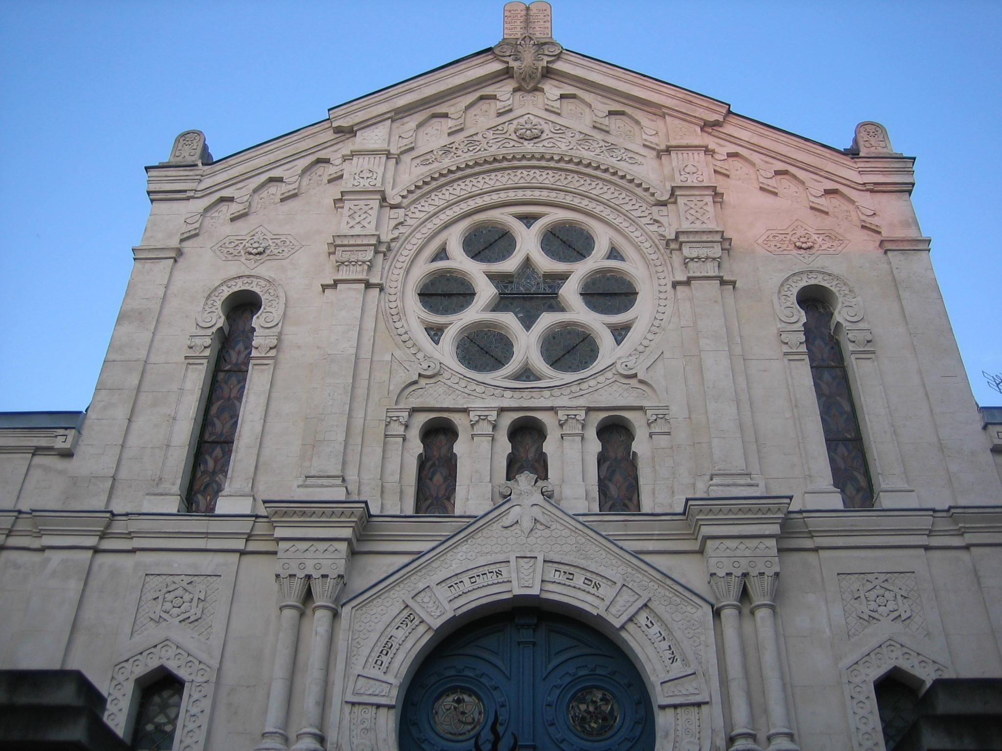 Synagogue de Reims, style néo-mauresque, inaugurée en 1879, œuvre de l’architecte Ernest Brunette - Au-dessus du portail est inscrit en hébreu le verset biblique Genèse 28:17 : "Ce [lieu] n'est autre que la maison de D.ieu, Et c'est la porte du ciel."